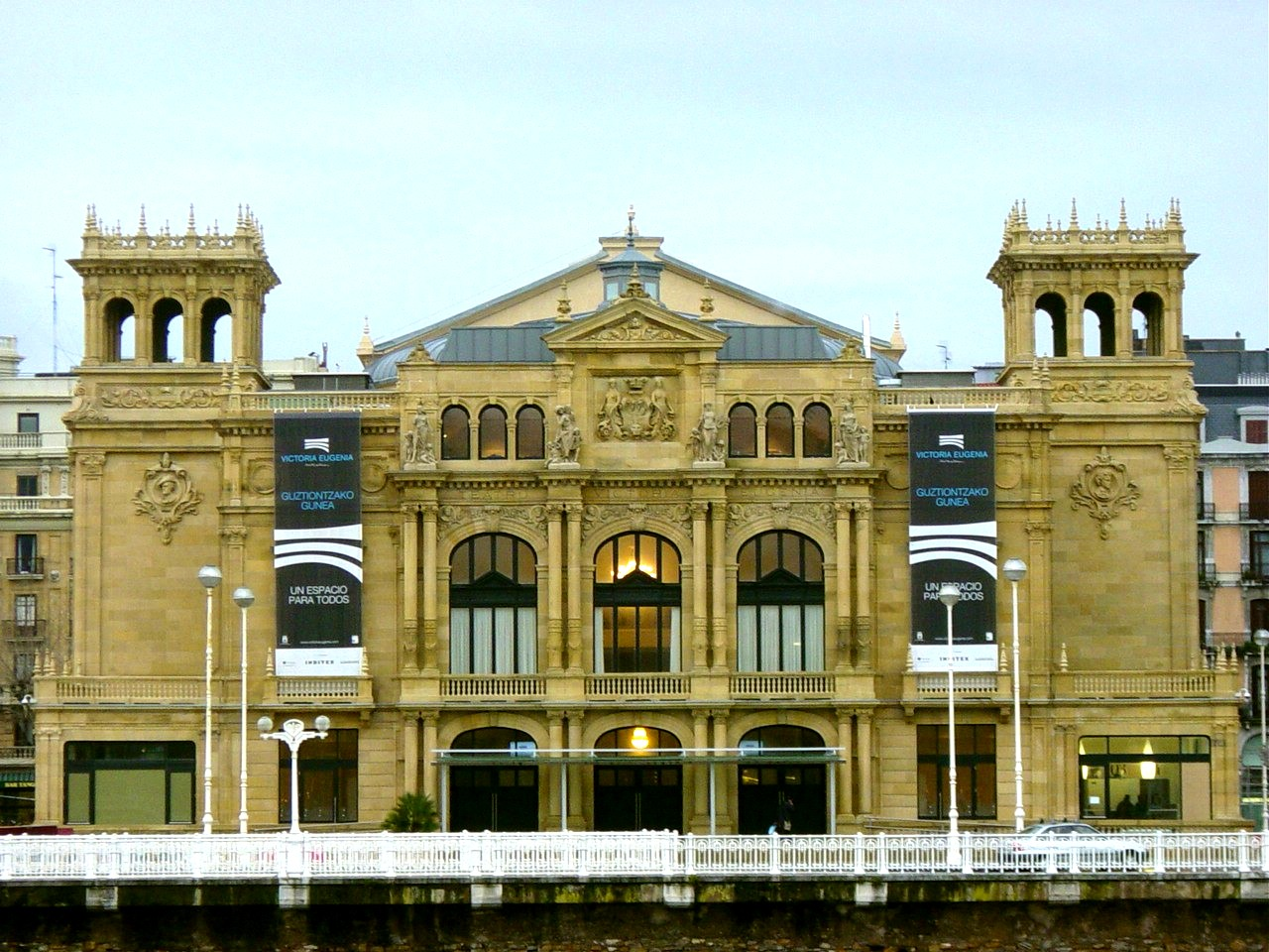 Teatro Victoria Eugenia (San Sebastian, SPAIN)